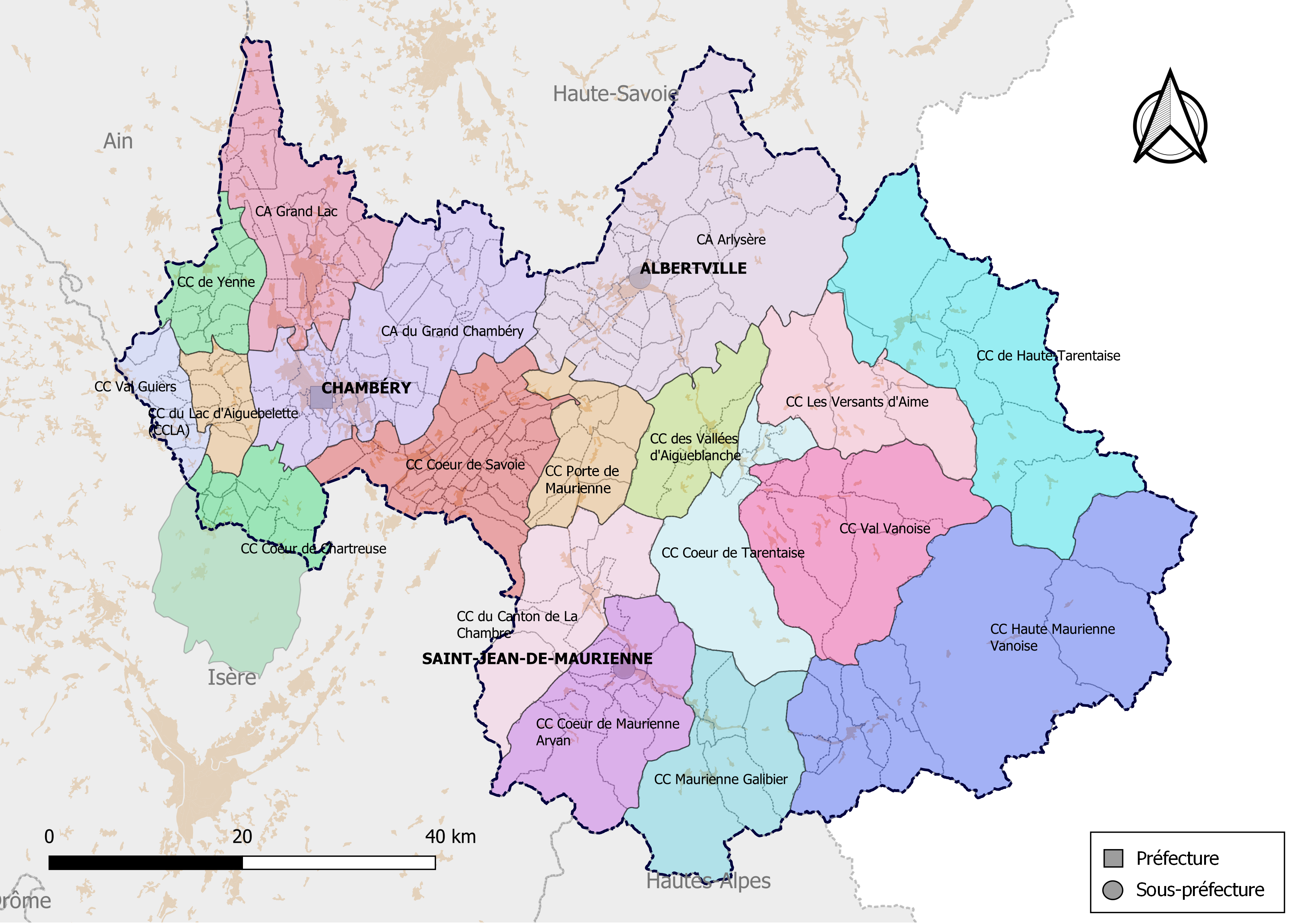 Carte des intercommunalités du département de la Savoie, France. Composition au 1er janvier 2019.